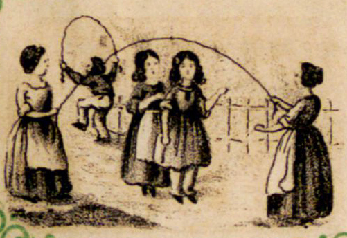 Illustration zu: Der kleine Kinderfreund : mit 76 Bildern in Tondruck. H. Müller-Schmid, Glarus (Schweiz), [1860?] 9. Seilspringen